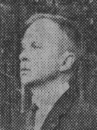 Arkitekten Wolfgang Huebner